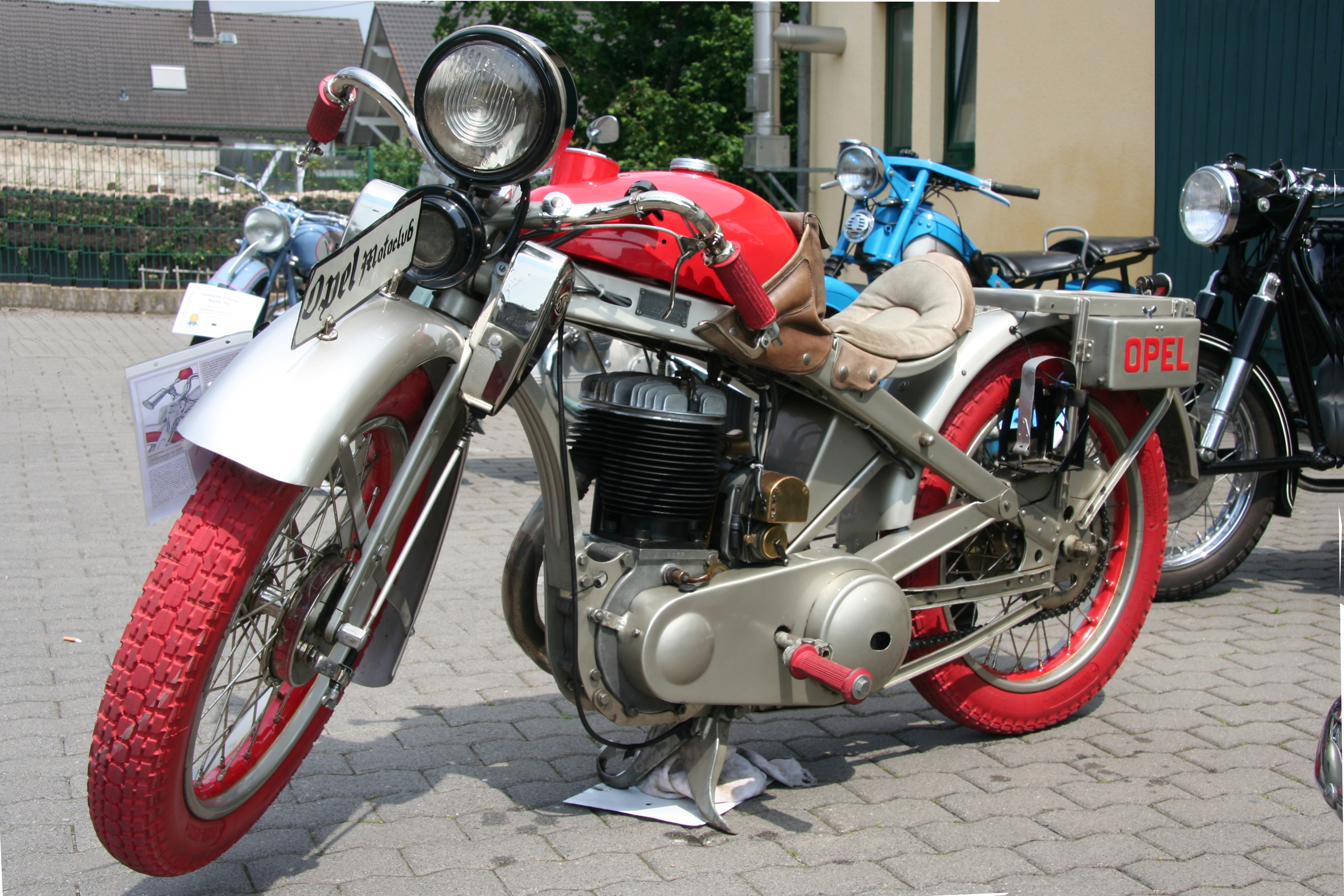 Opel Motoclub T, gebaut von 1928 bis 1930, Motor mit stehenden Ventilen, Leistung 16 PS. Das Modell T oder „Tour“ hat im Gegensatz zur stärkeren „Super Sport“ nur ein Auspuffrohr.